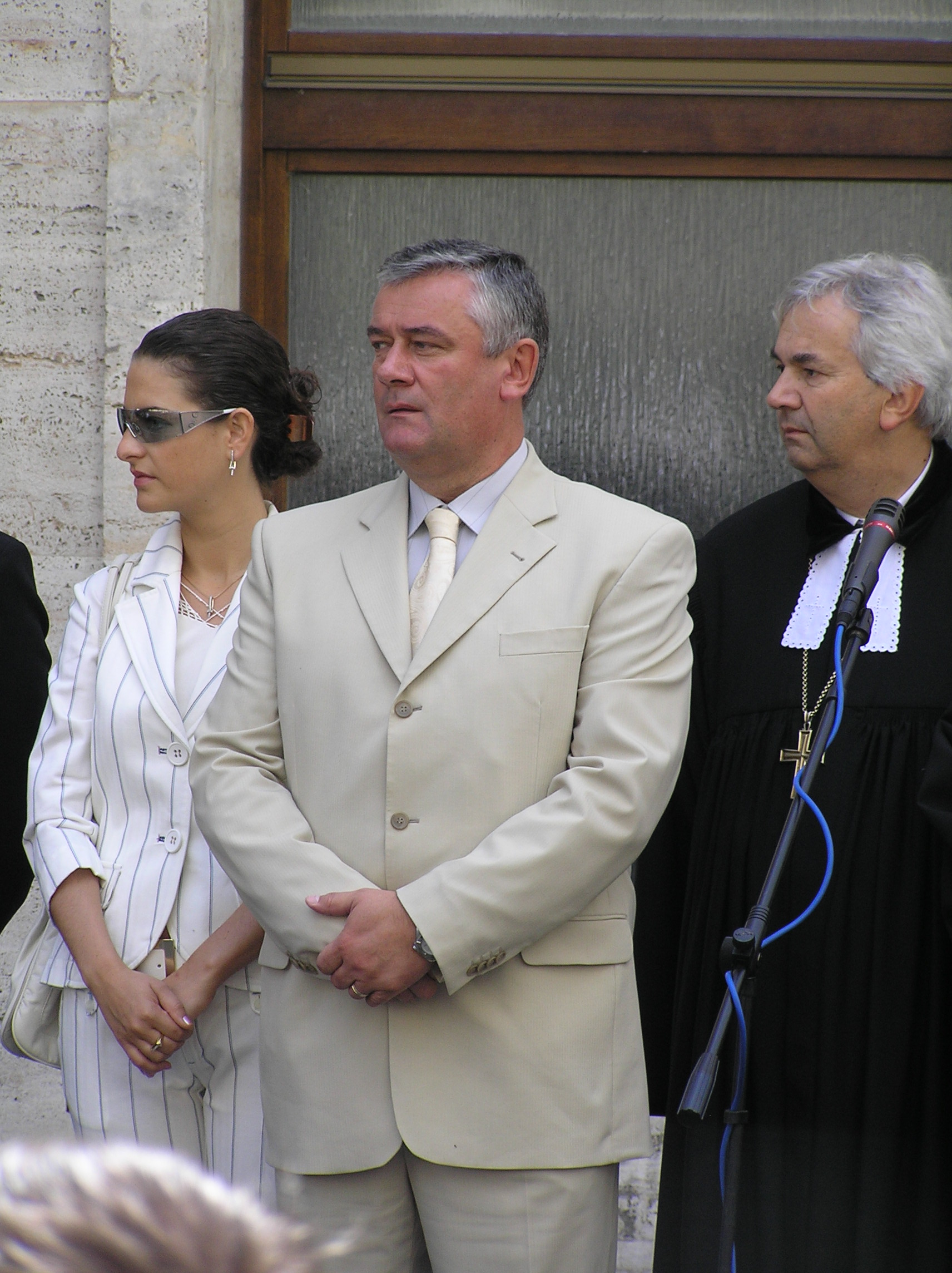 Príhovor Ľubica a Ján Slota